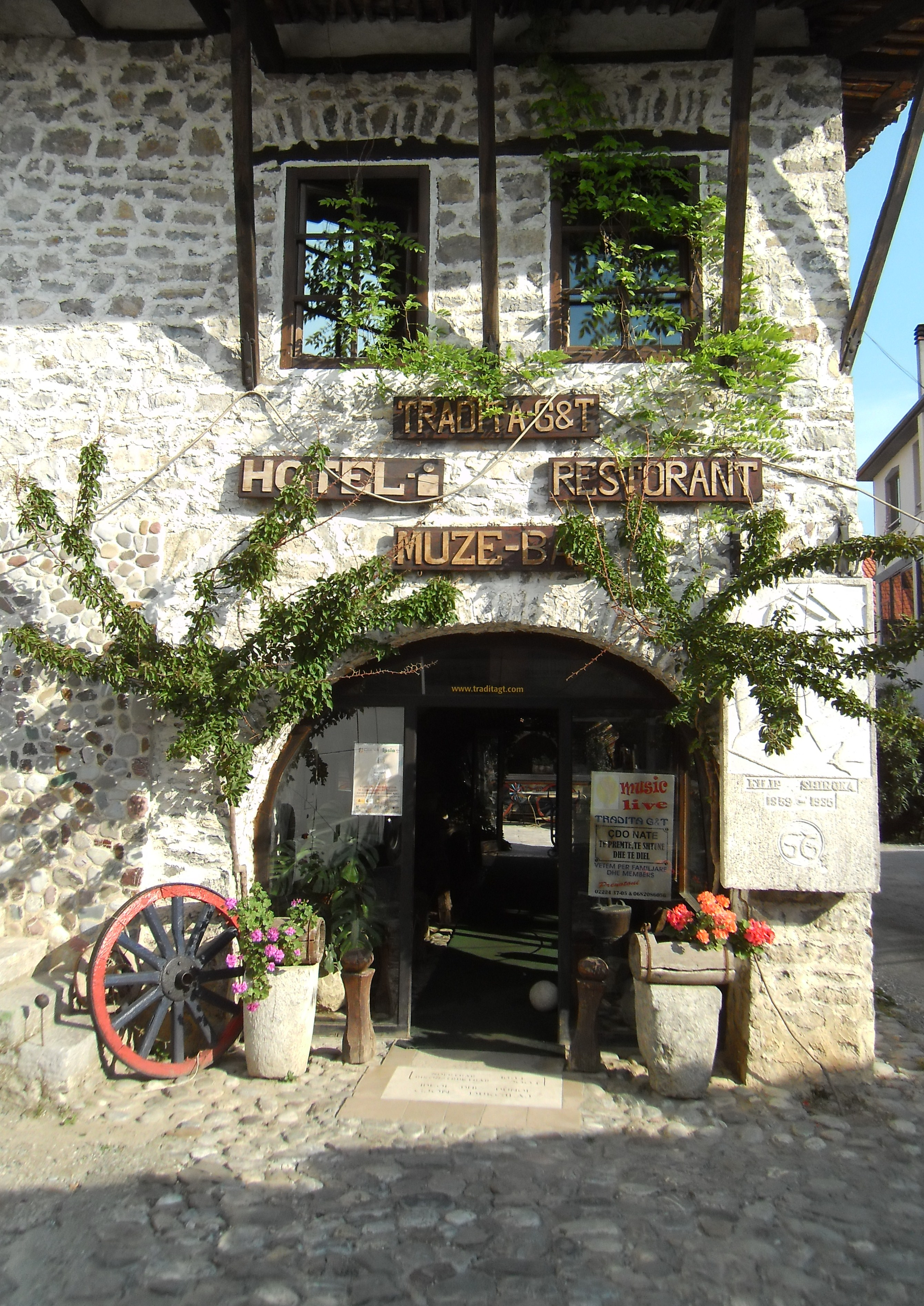 Hoteleingang